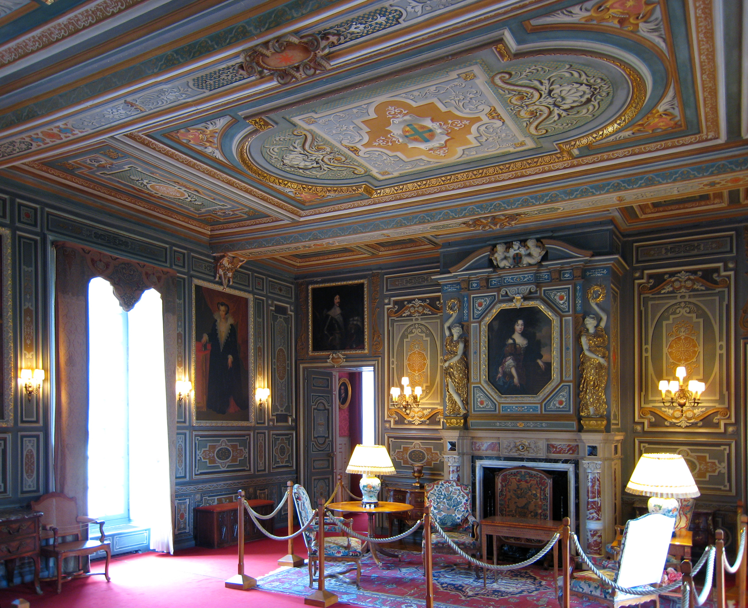 Château de Cheverny, Loir-et-Cher, France - grand salon